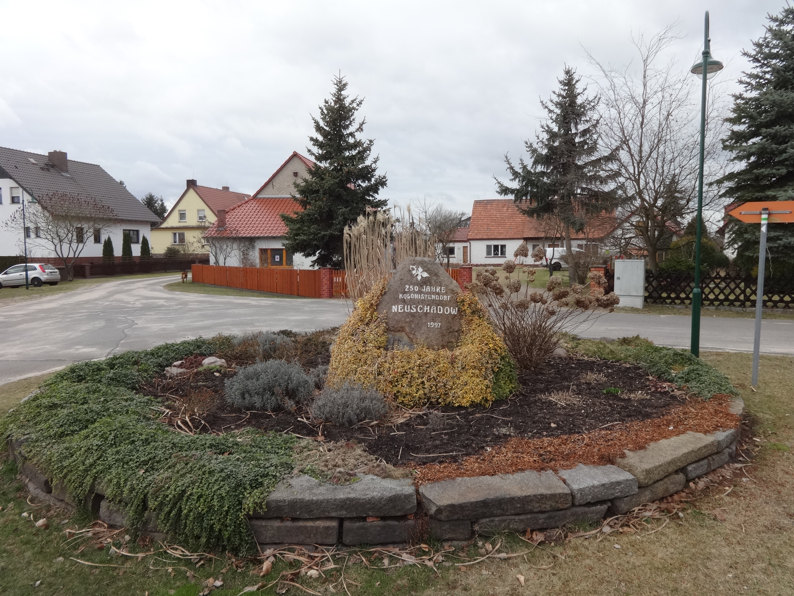 Neu Schadow, Gemeinde Märkische Heide, Brandenburg